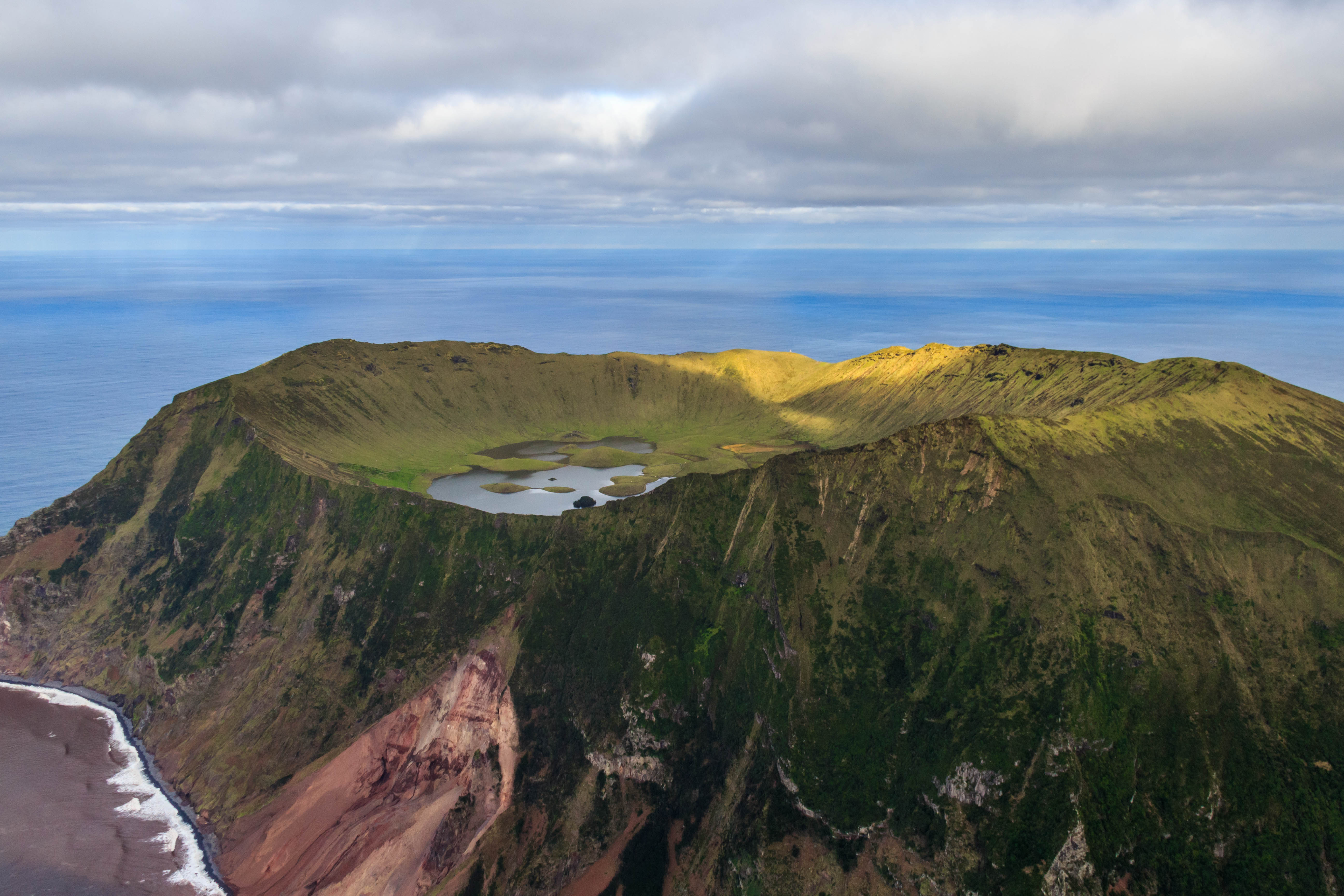 Fotografia aérea da costa e do caldeirão da ilha do Corvo após uma derrocada de 10.000 toneladas de terra para o mar. This is a photography of a protected area of Portugal indexed in the World Database on Protected Areas with the ID: 555540893 (WDPA)